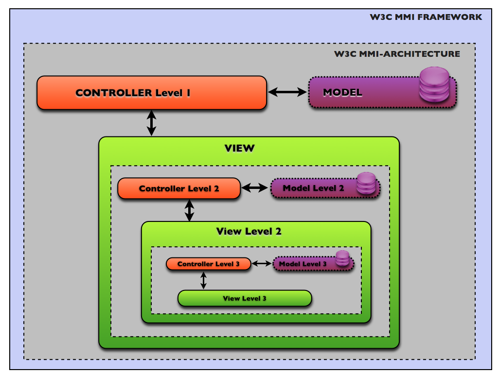 Nested Dolls Model